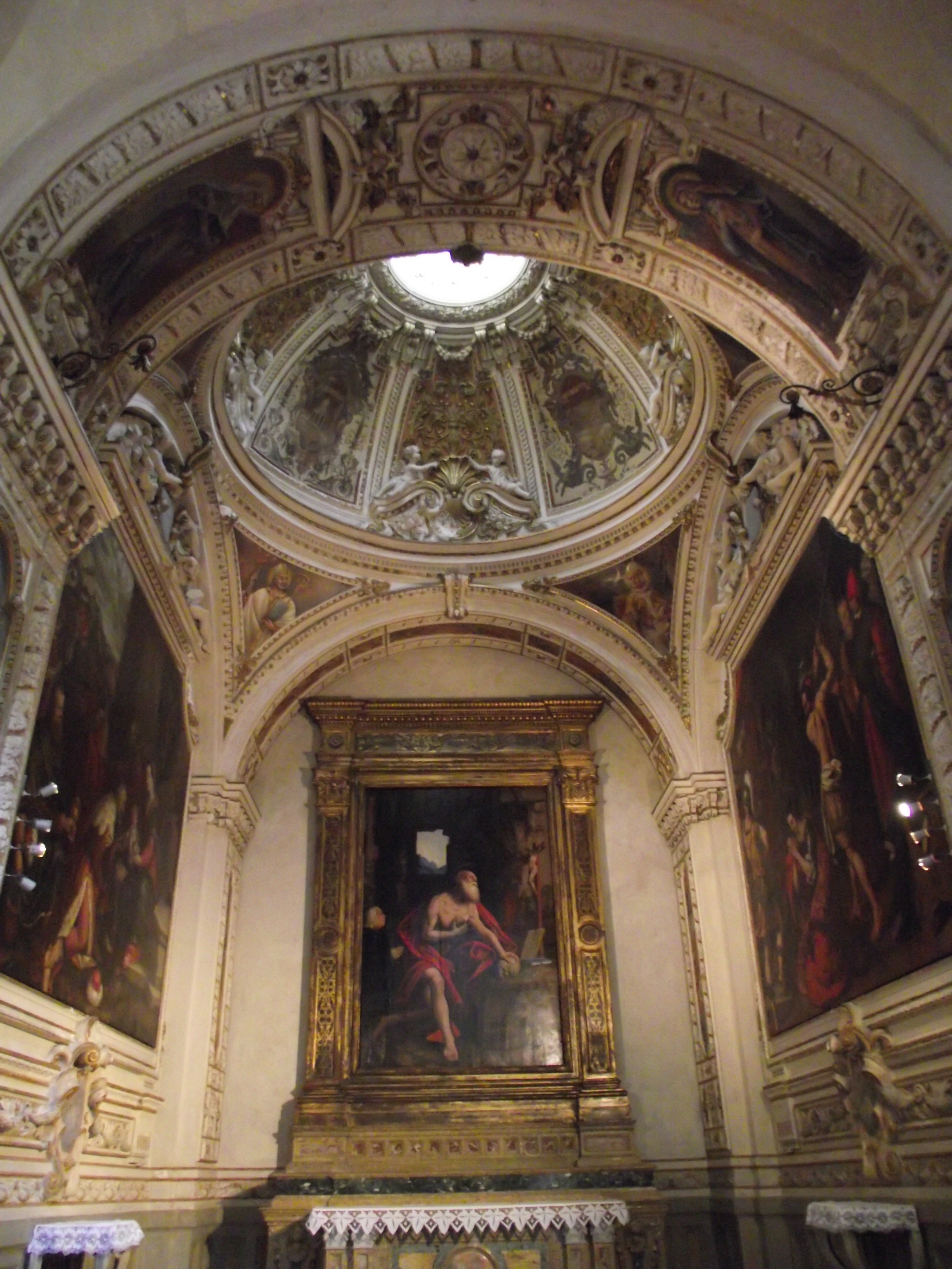 Cappella di San Girolamo